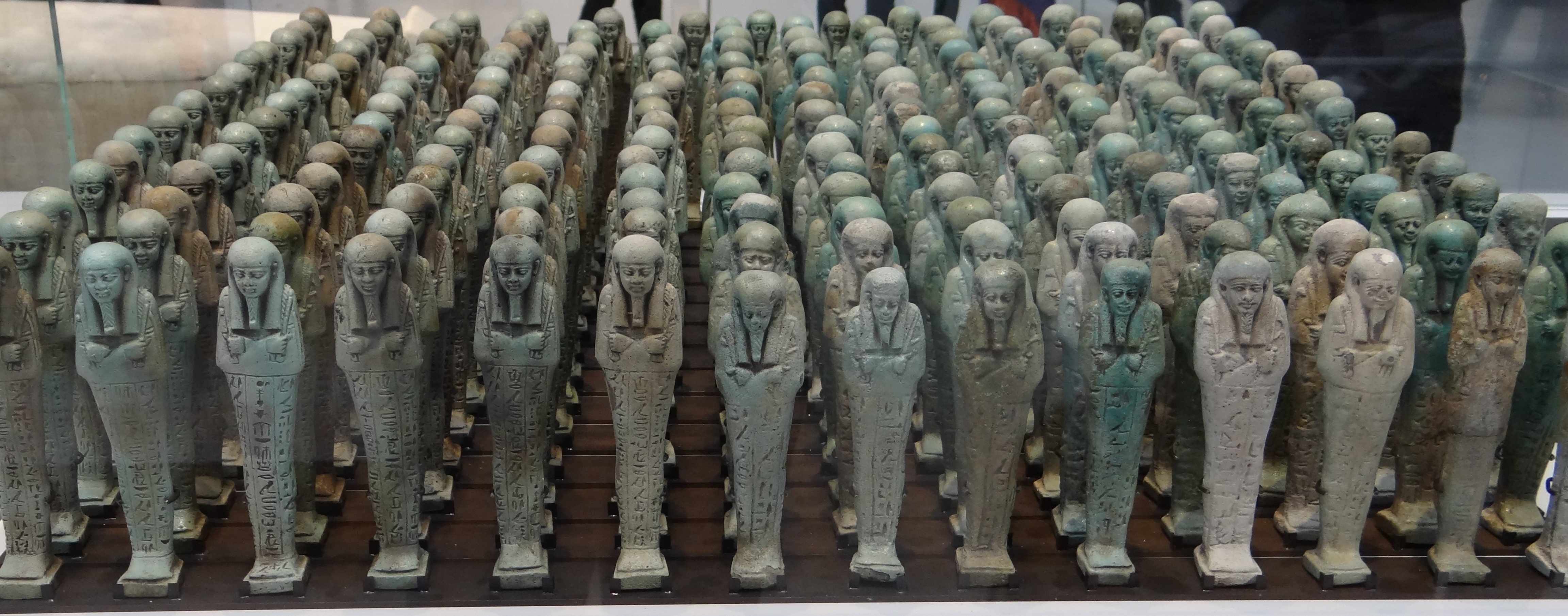 Menphis - Egypte - 500before JC - Troop of funerary servant figures shabtis in the name of Neferibreheb